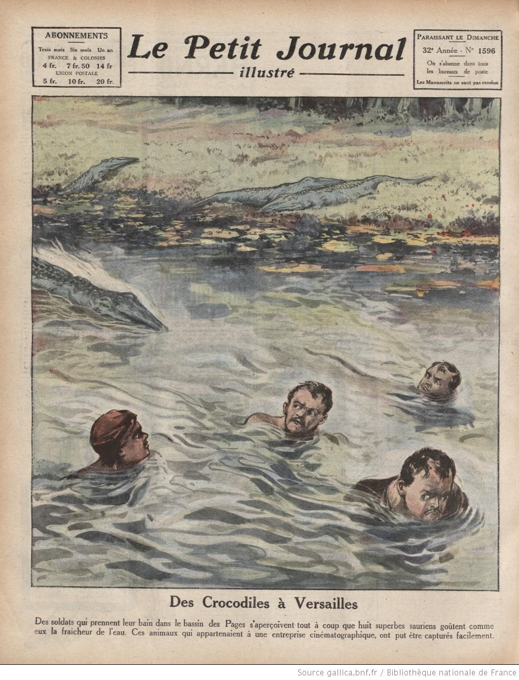 « Des Crocodiles à Versailles » - Le Petit Journal illustré, 4e de couverture, 24 juillet 1921, n° 1596 - Légende : Des soldats qui prennent leur bain dans le bassin des Pages s'aperçoivent tout à coup que huit superbes sauriens goûtent comme eux la fraîcheur de l'eau. Ces animaux qui appartenaient à une entreprise cinématographique ont put (sic) être capturés facilement.